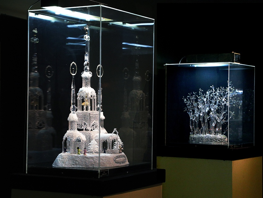 Композиции из "Пушкинской" серии работ Алексея Зеля: "Золотой петушок" и "Аллея Анны Керн".